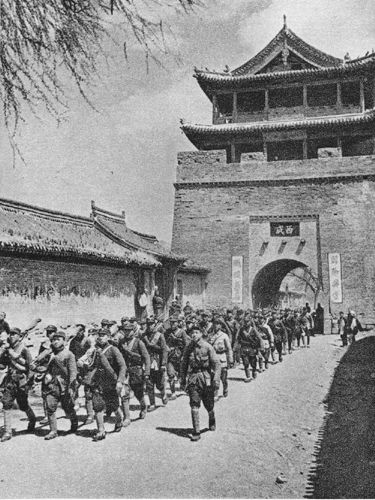 1944年5月2日，我军进驻察哈尔赤城县后城